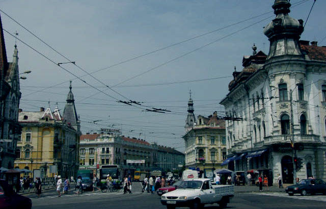 Regele Ferdinand Street, Cluj-Napoca, Romania